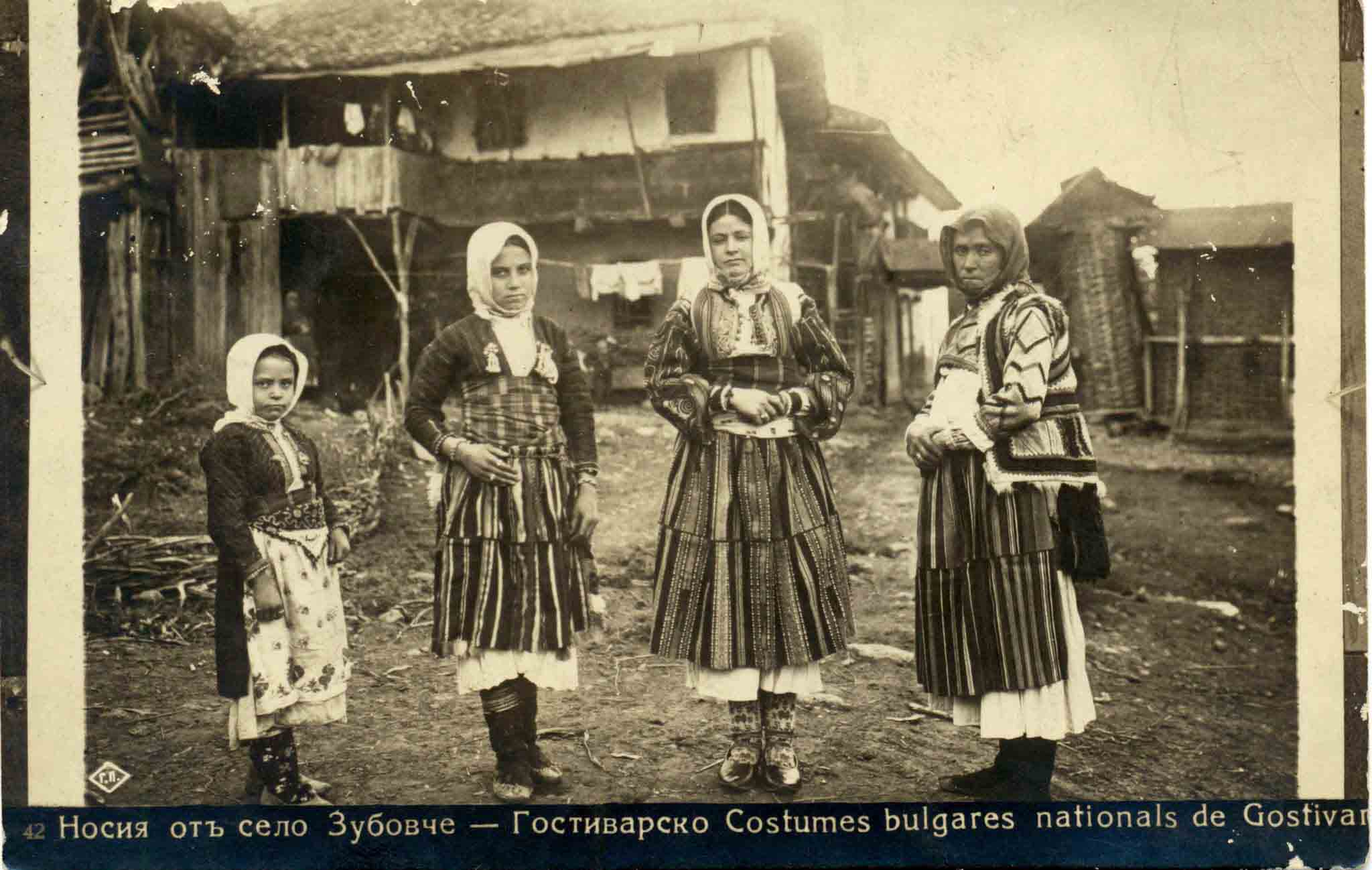 Селянки от Зубовце, Гостиварско, през Първата световна война